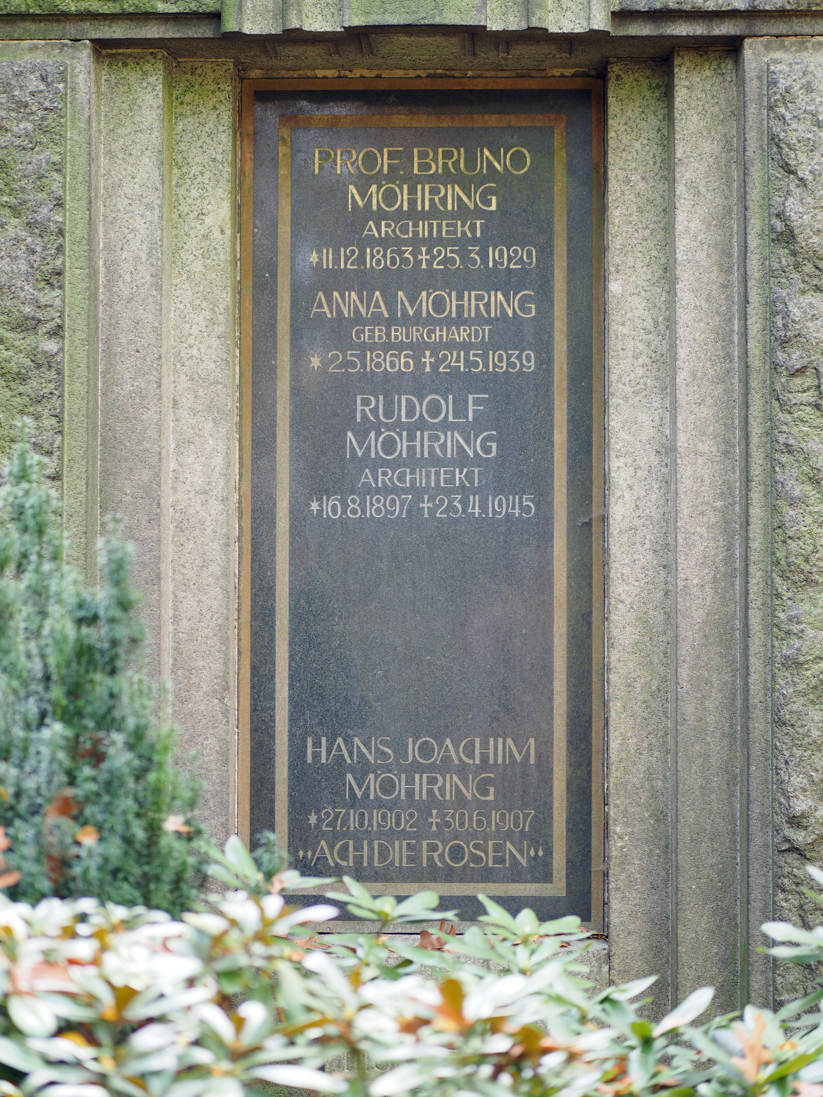 Friedhof Marienfelde in Berlin Grabplatte des Familiengrabes Möhring